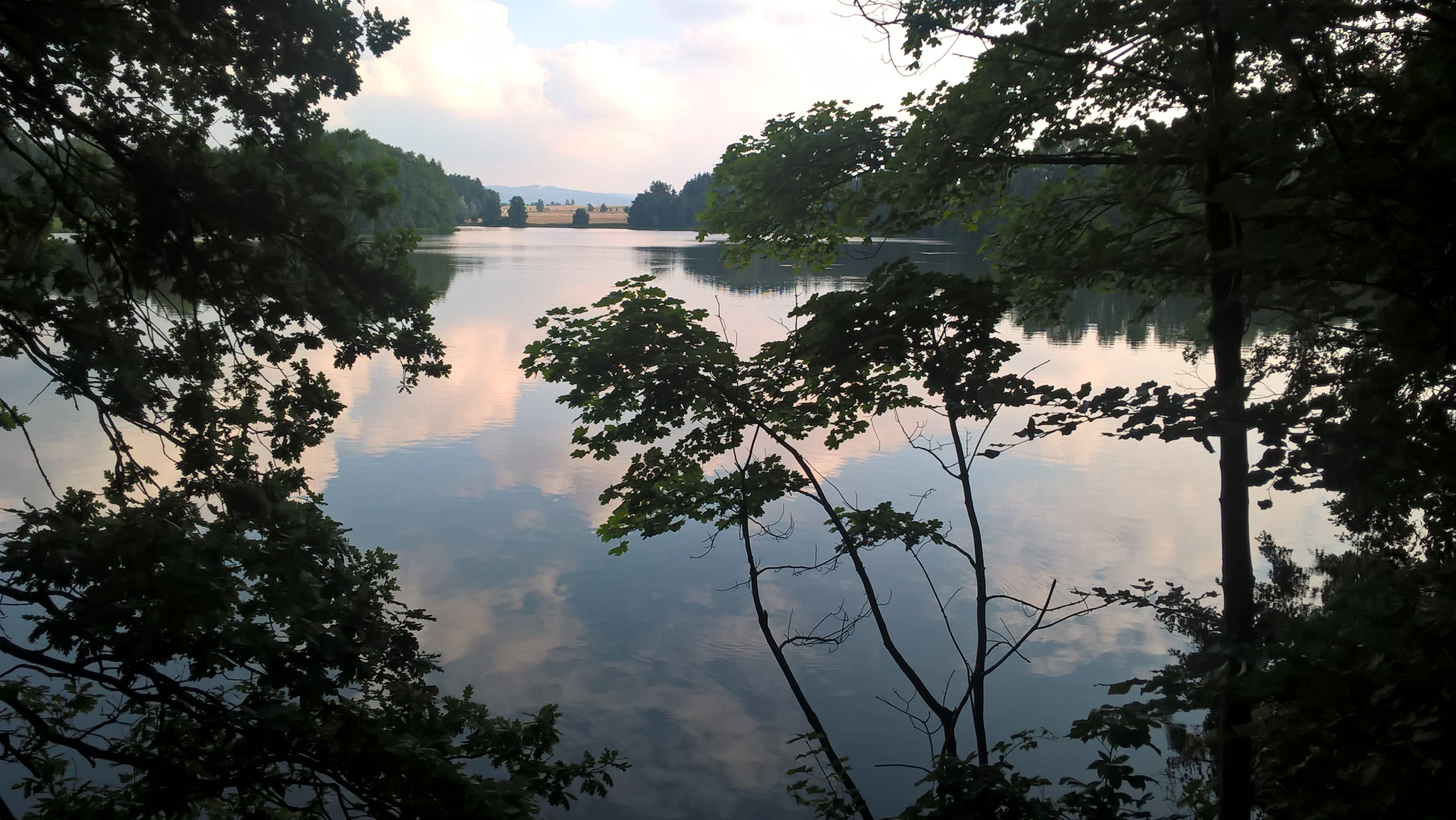 Kamenná trouba - rybník